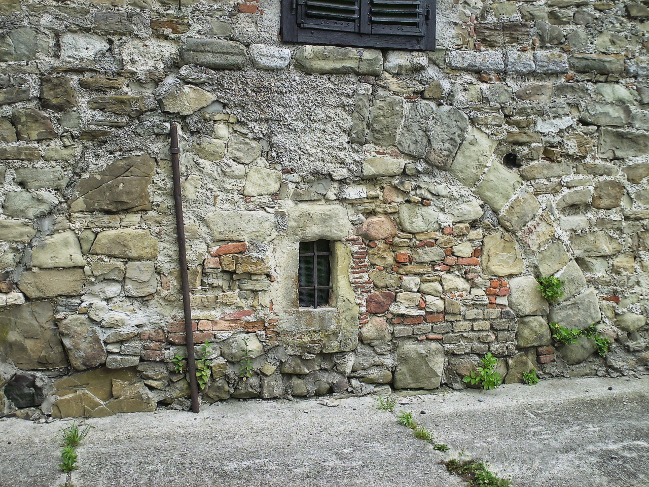 Zeiselmauer/Körnerkasten: Oberer Teil des Torbogens des ehemaligen Osttores.